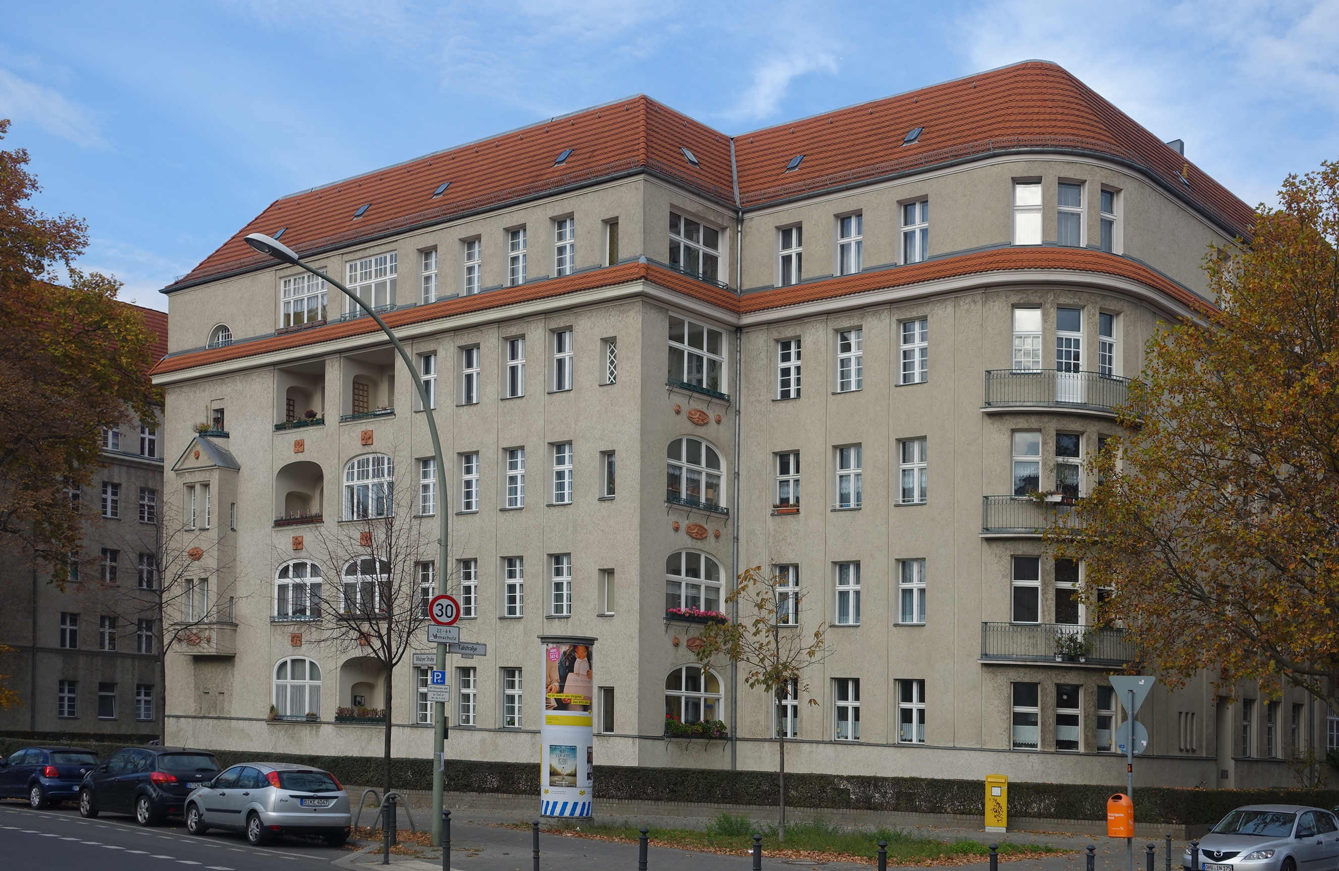 Wohnanlage